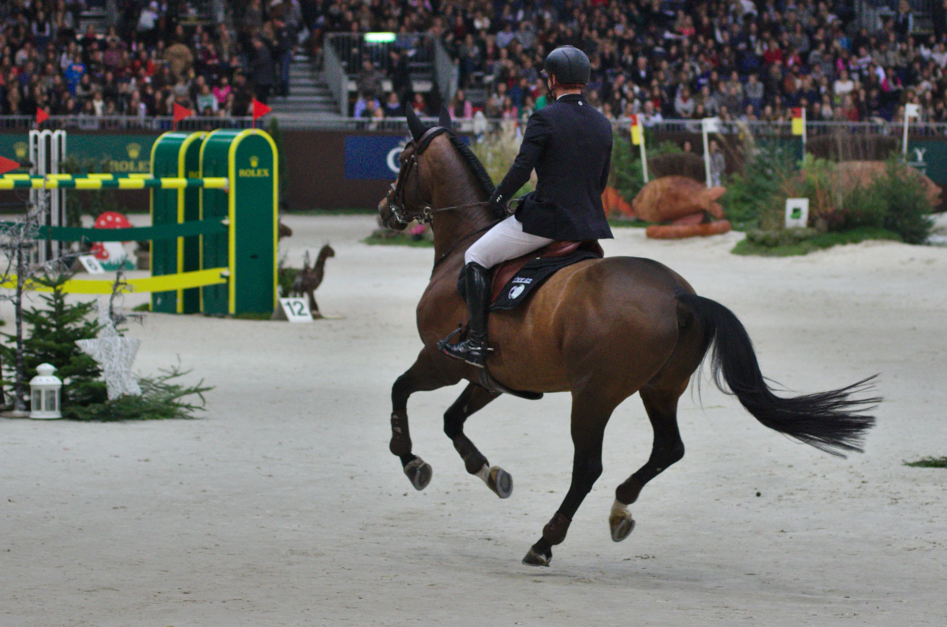 54eme CHI de Genève - 20141213 - Prix Credit Suisse - Romain Duguet et Otello du soleil